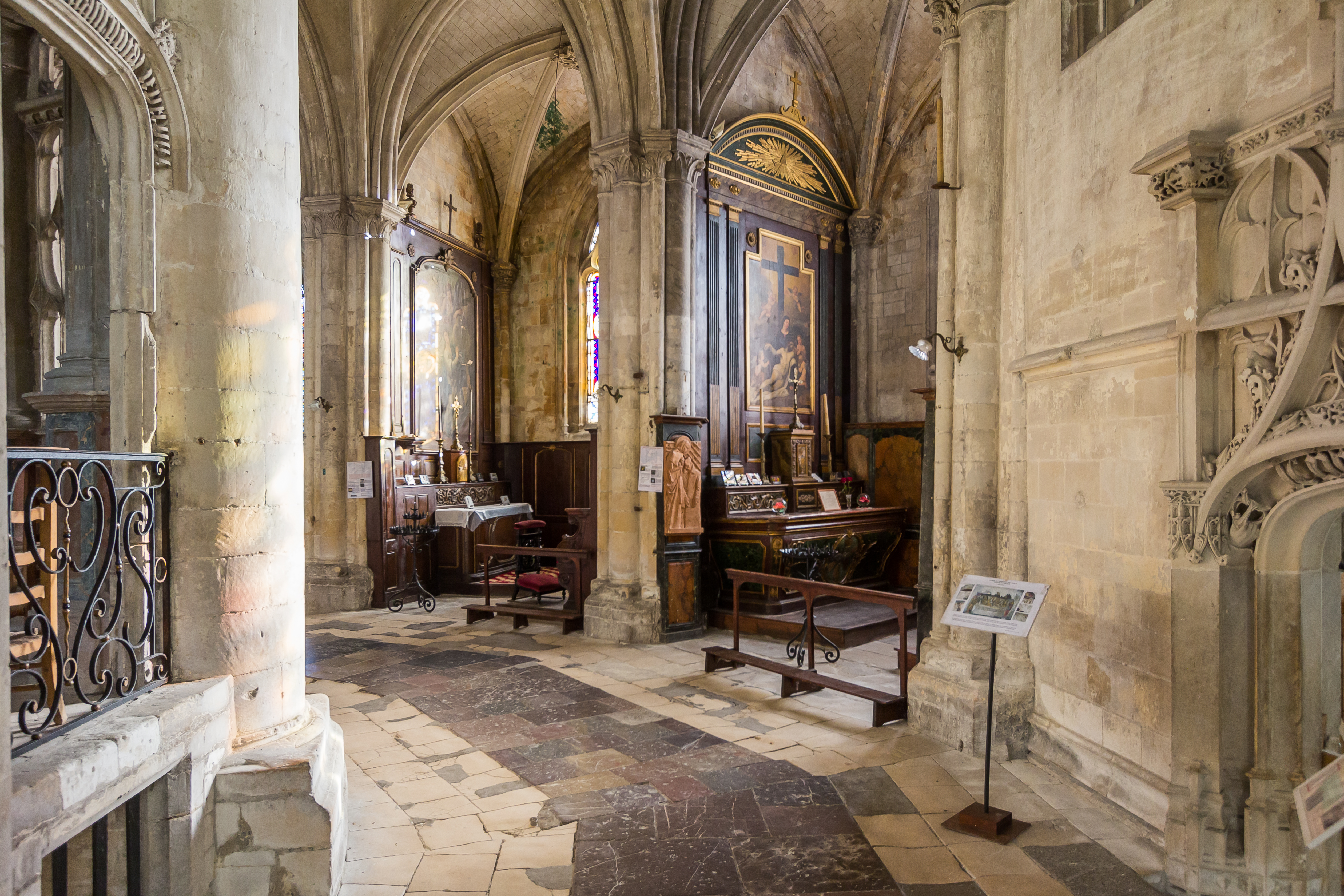 Collégiale Notre-Dame et Saint-Laurent d'Eu - Déambulatoire